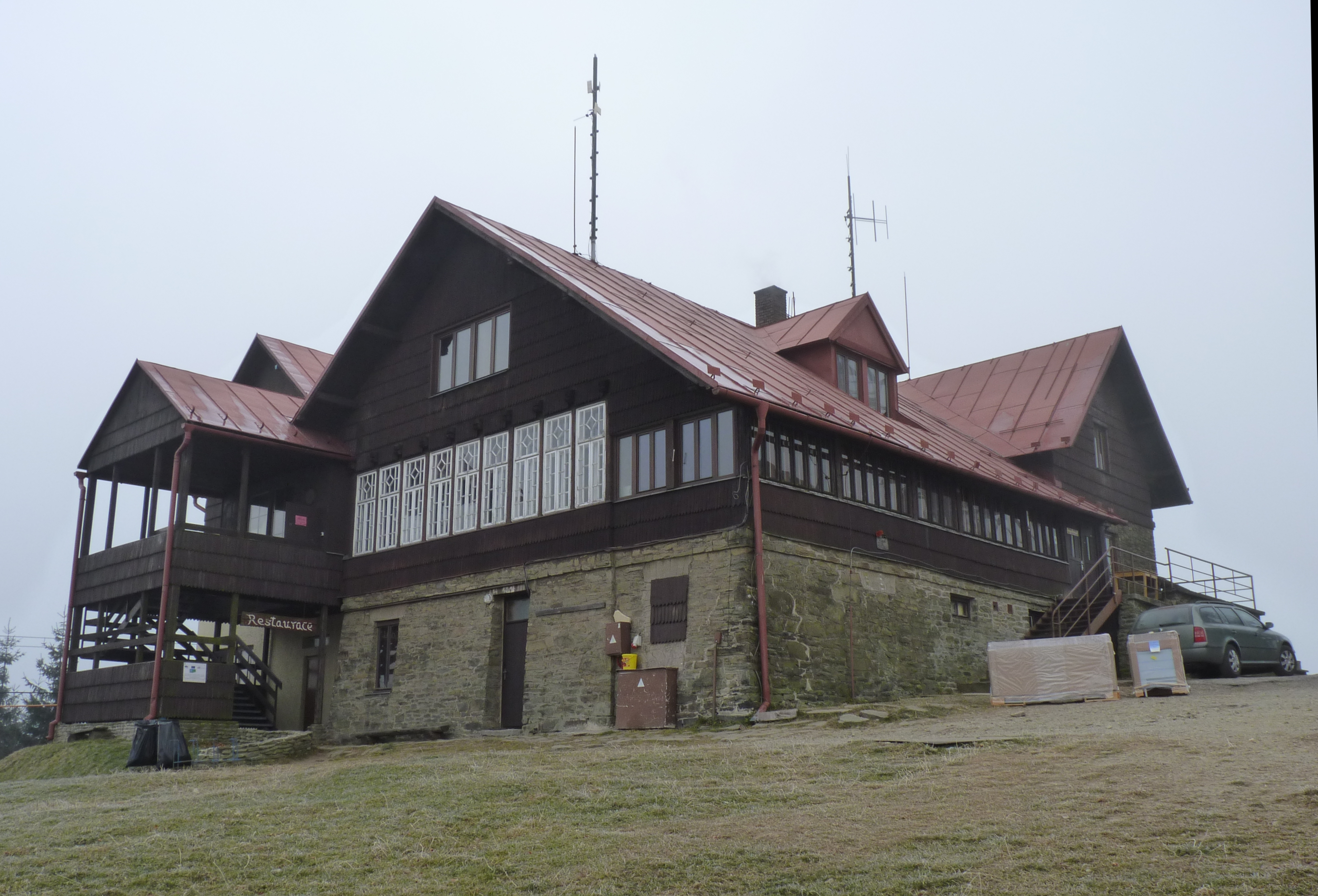 Javorový vrch, Moravskoslezské Beskydy